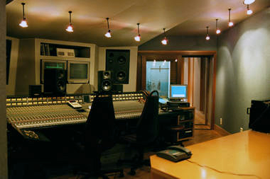 Salle de contrôle du studio Synsounds à Bruxelles, équipé d'une table de mixage et d'enceintes.